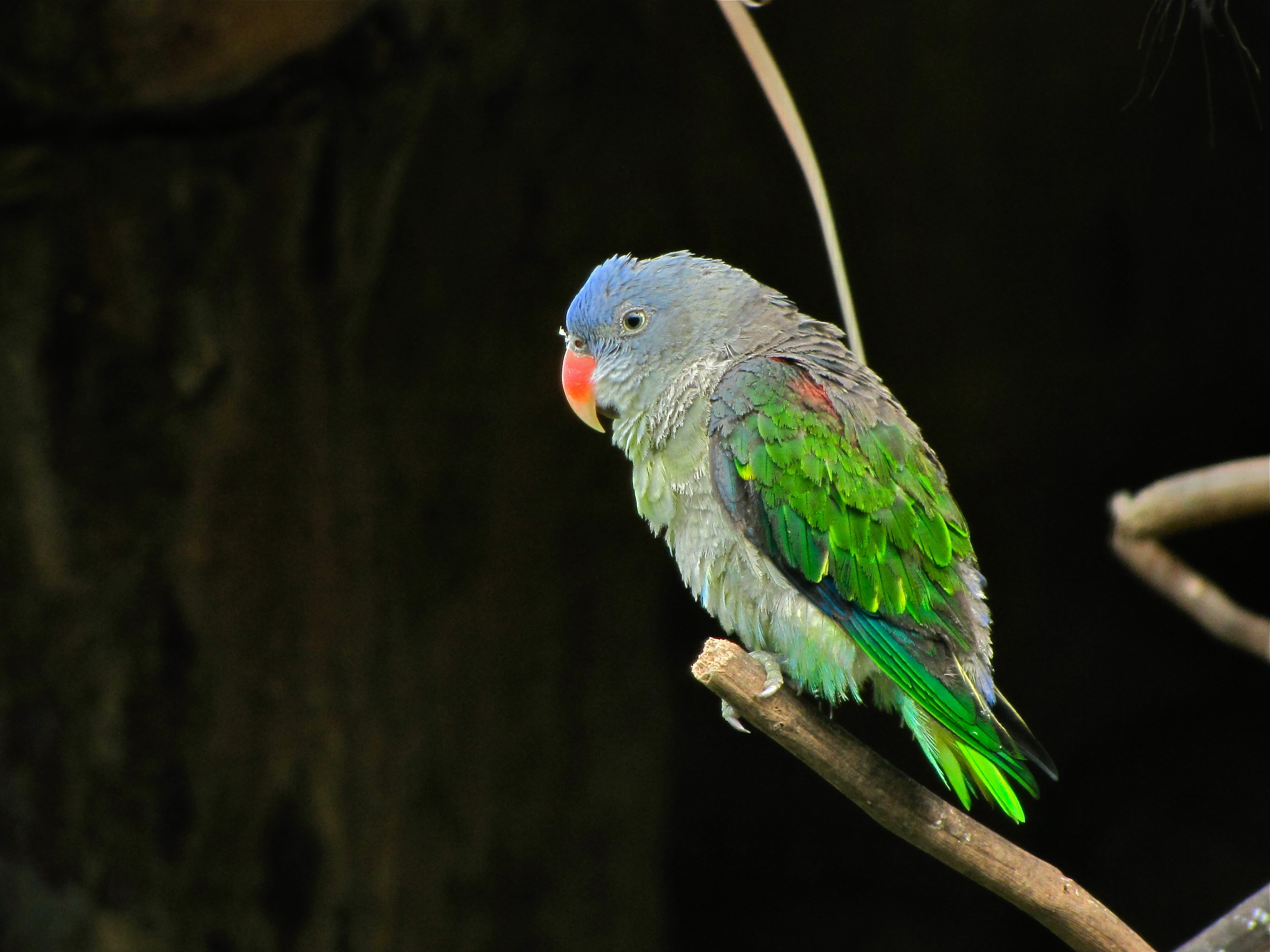 Bird Park Kuala Lumpur